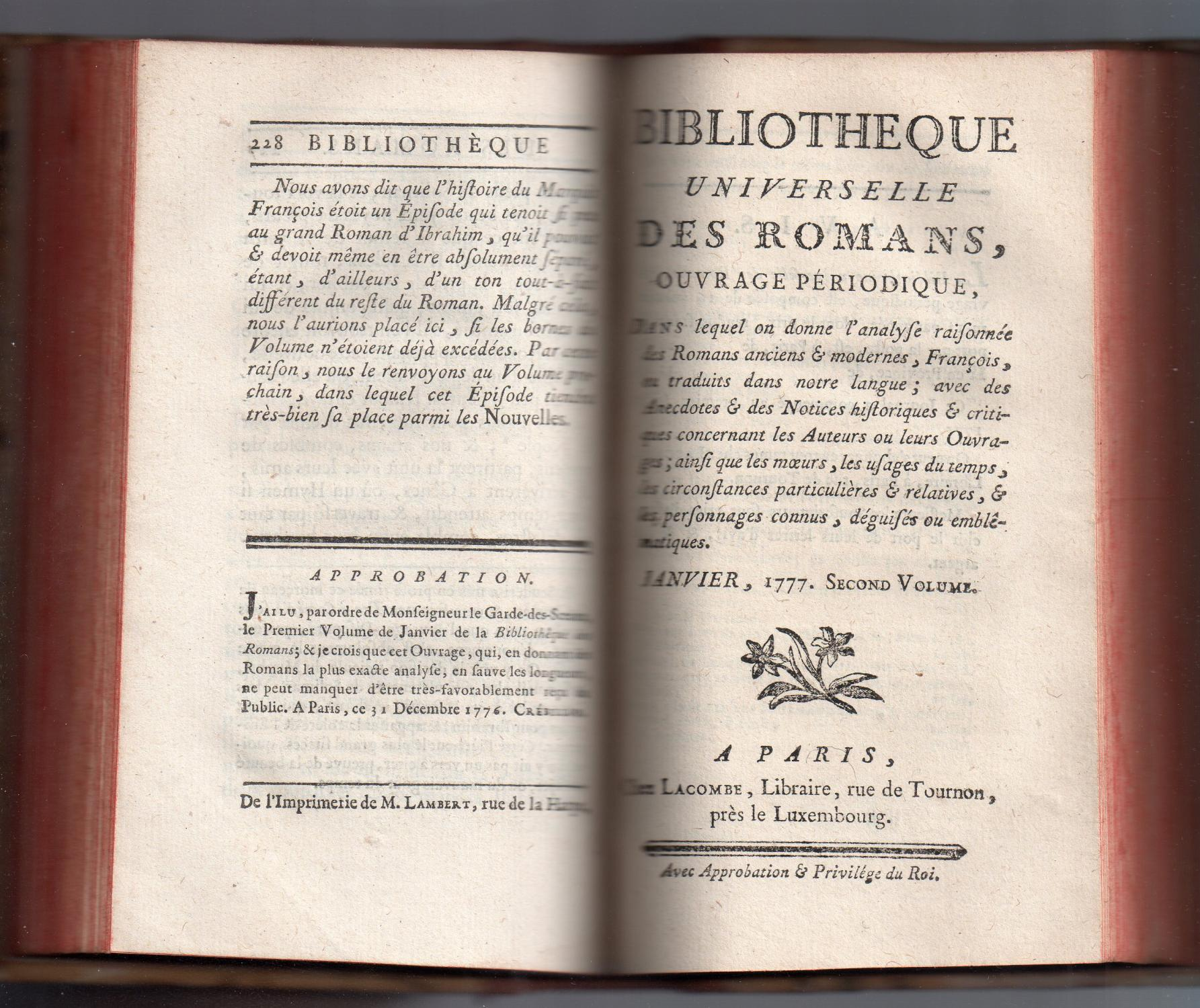 Титульный лист январского выпуска Bibliothèque universelle des romans. 1777 год